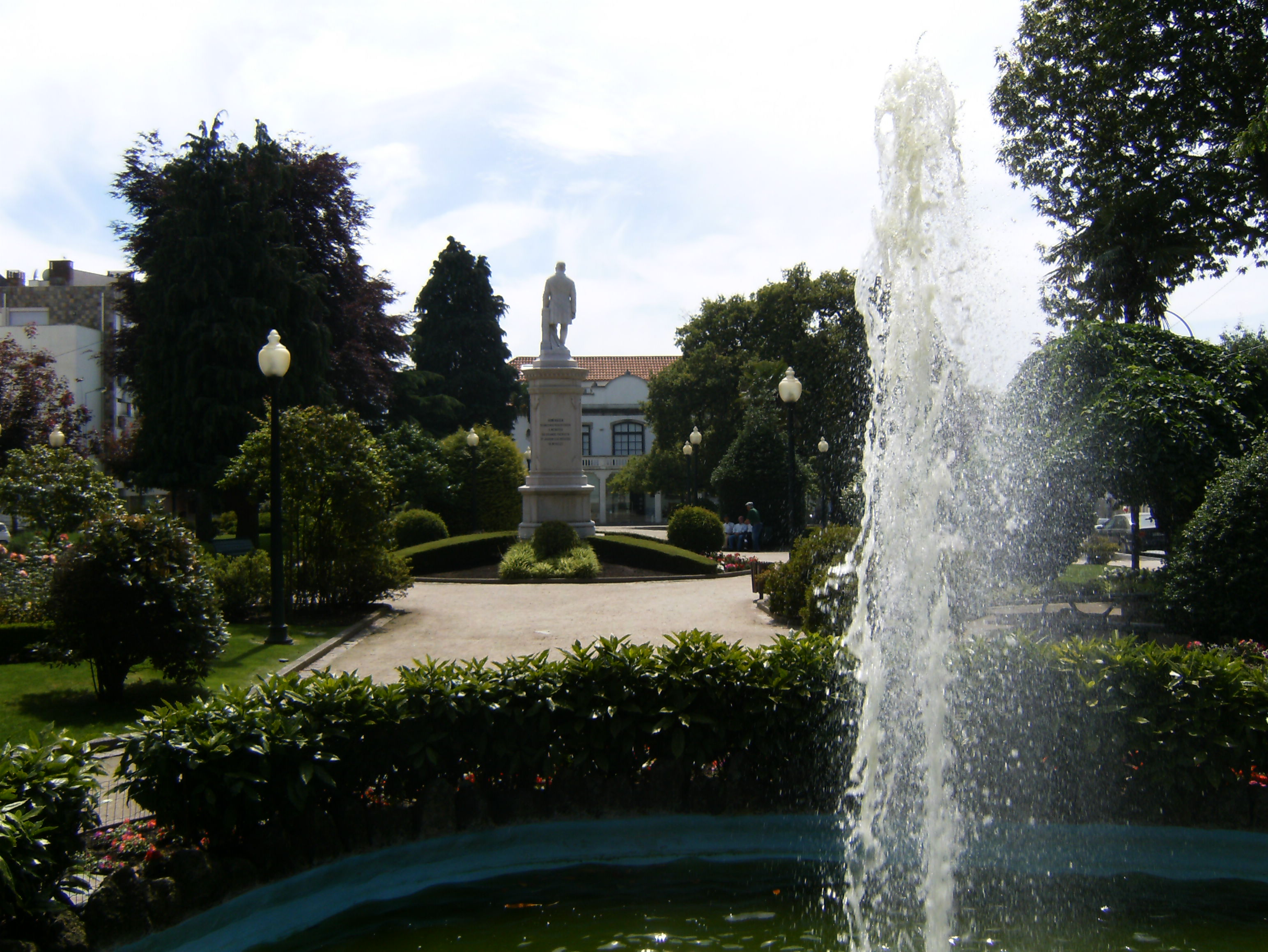 Jardim Municipal de Paços de Ferreira